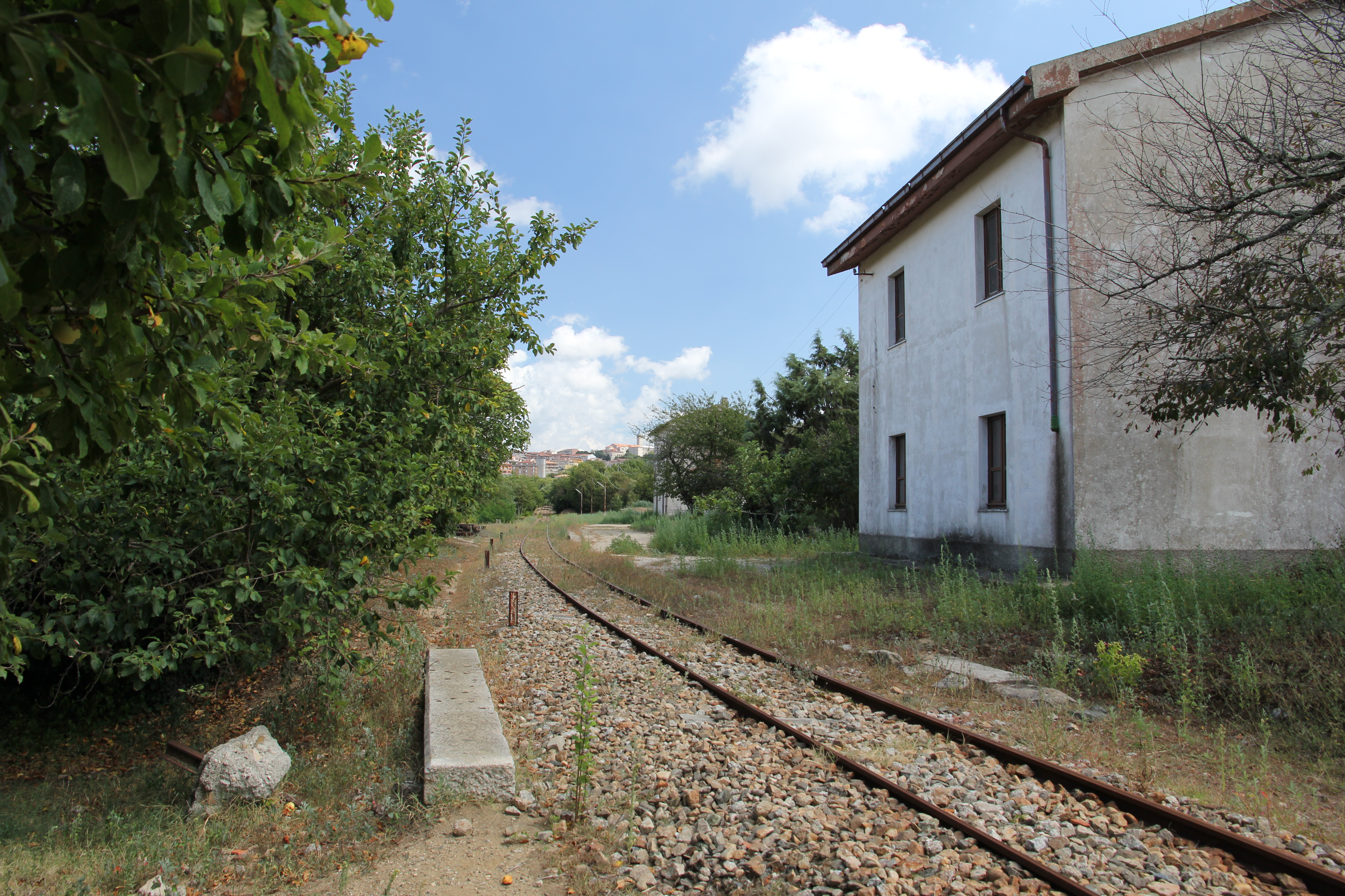 Aggius - Stazione ferroviaria